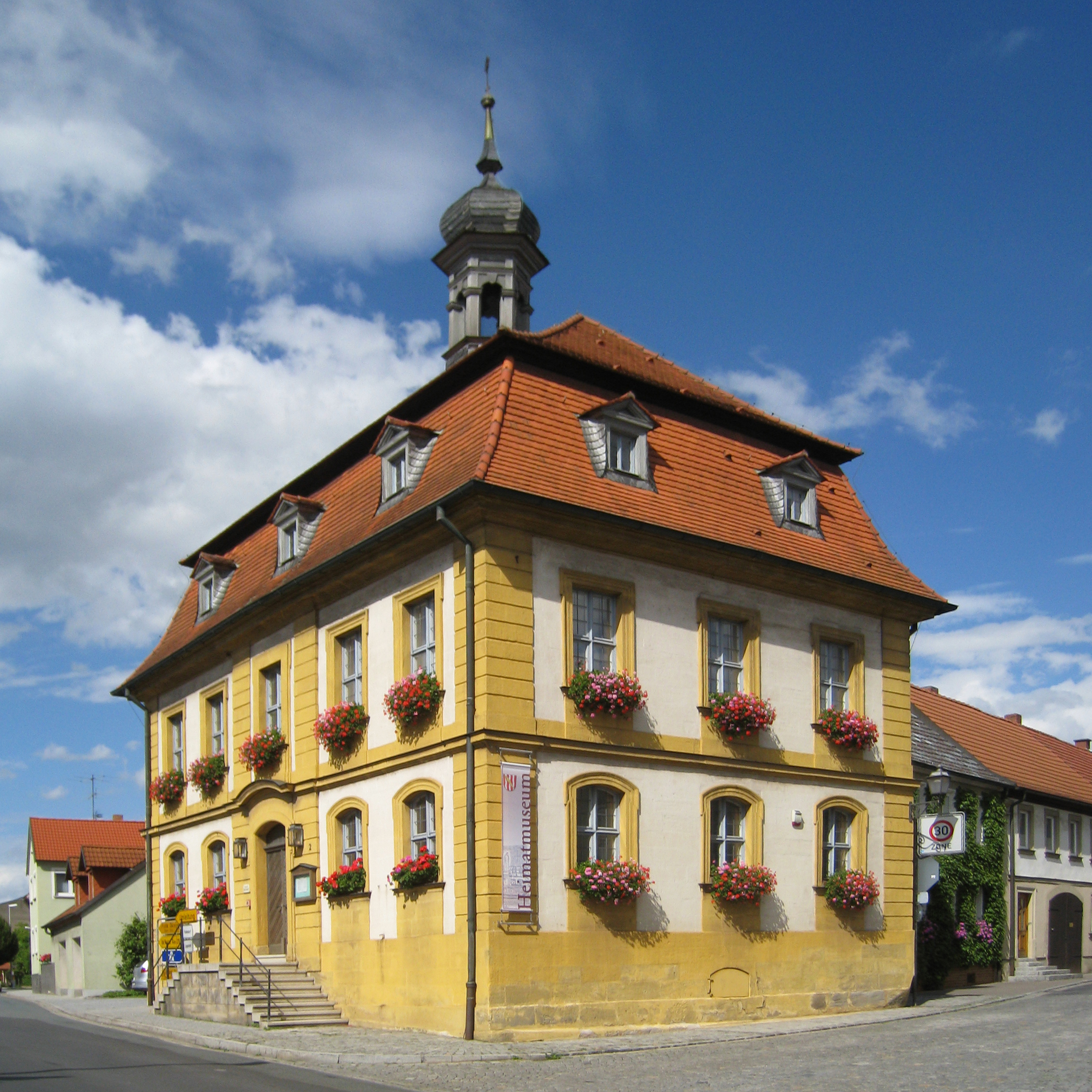 Altes Rathaus der Stadt Baunach, Schloss Schadeck, jetzt Heimatmuseum